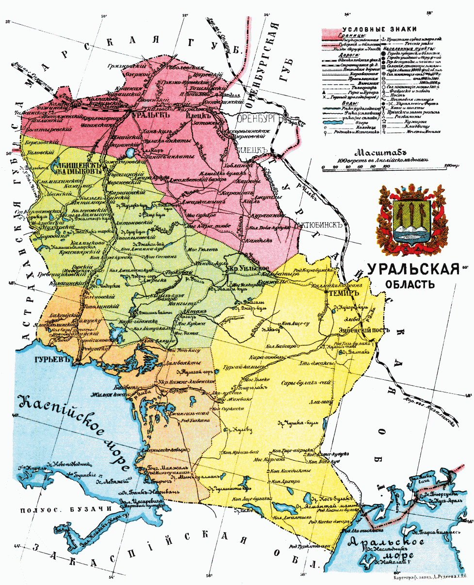 Карта Уральской области, 1913